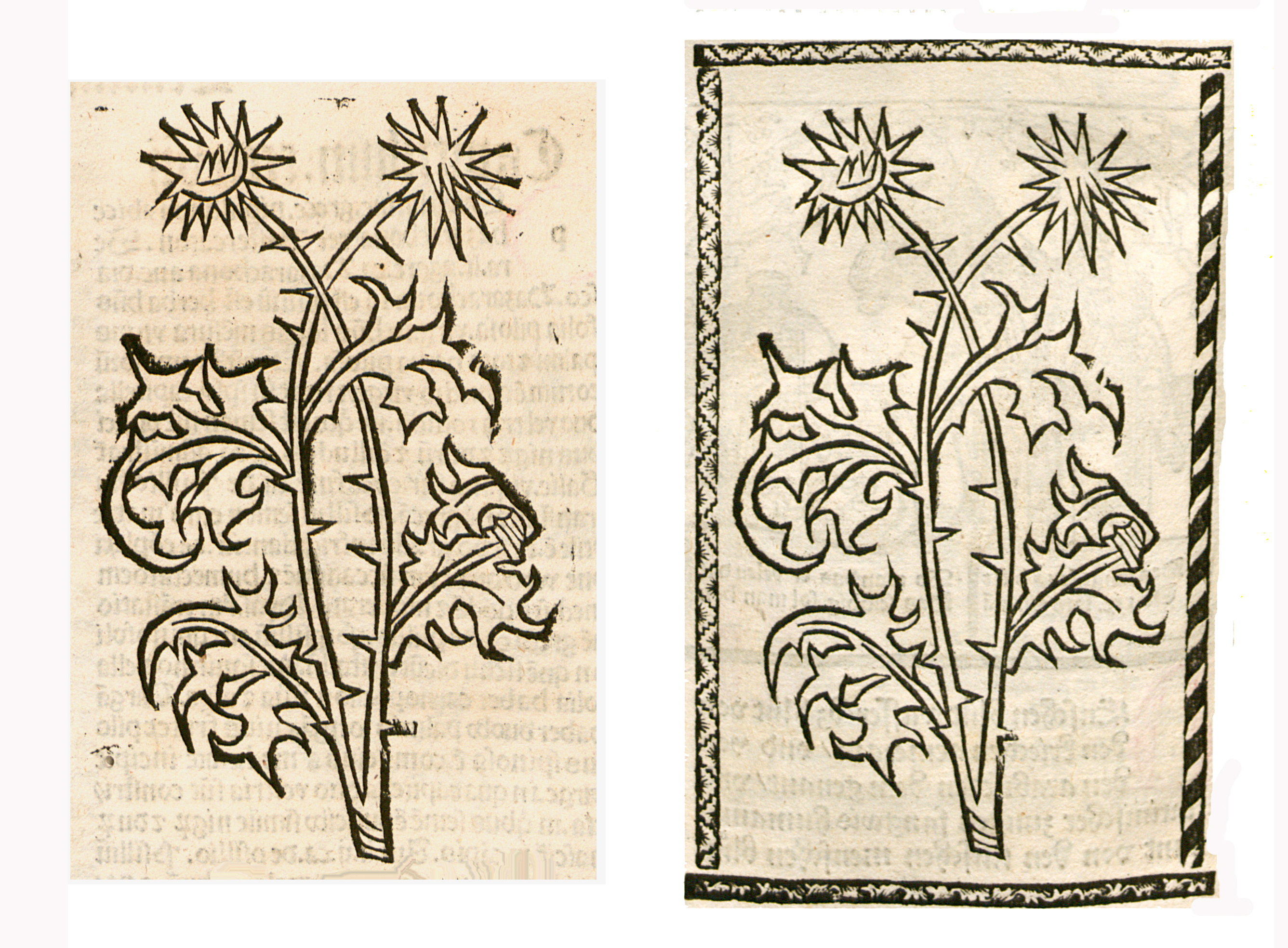 Abbildung von: Manß Trü (Eryngium campestre)